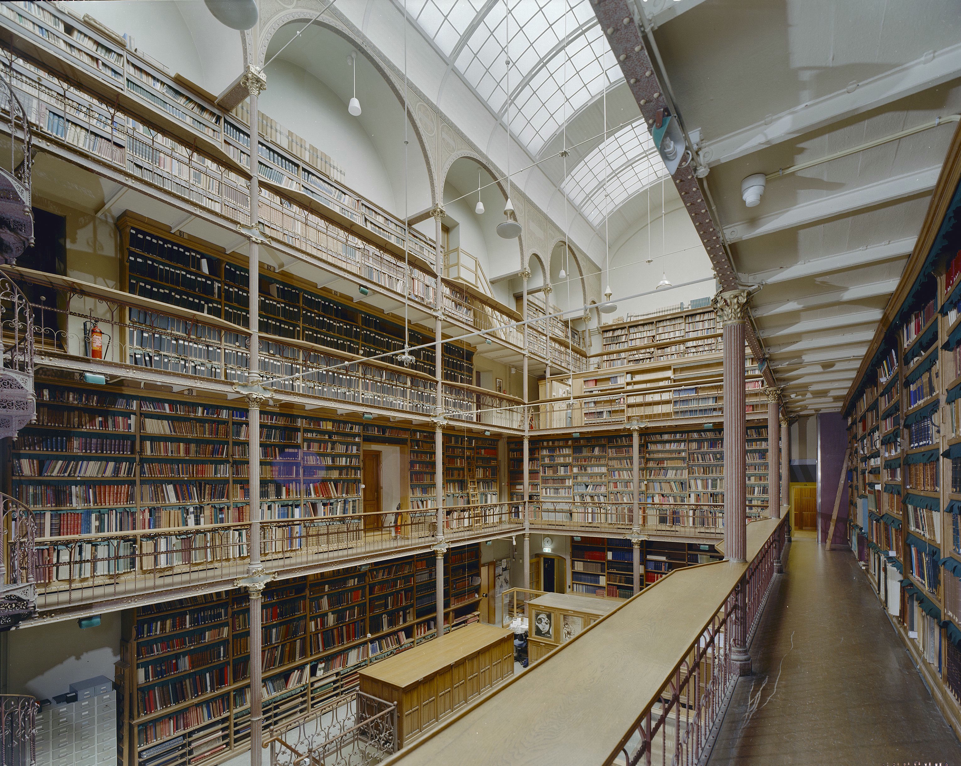 Rijksmuseum, bibliotheek: Interieur overzicht bibliotheekzaal